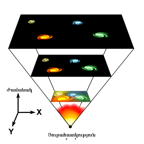 Տիեզերքի ընդլայնական կտրվածք